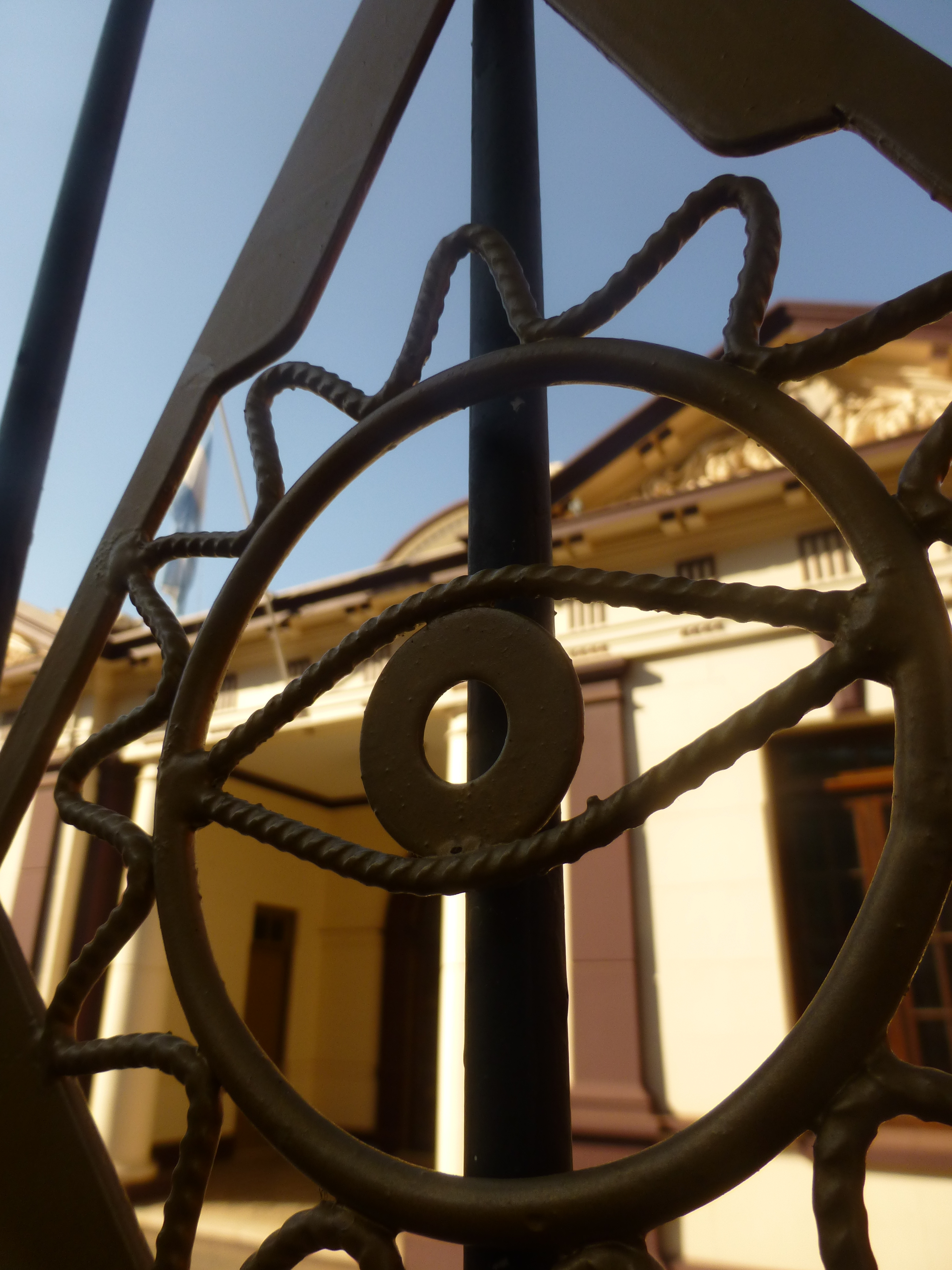 Logia Masónica Roque Pérez de la ciudad de Posadas, provincia de Misiones.